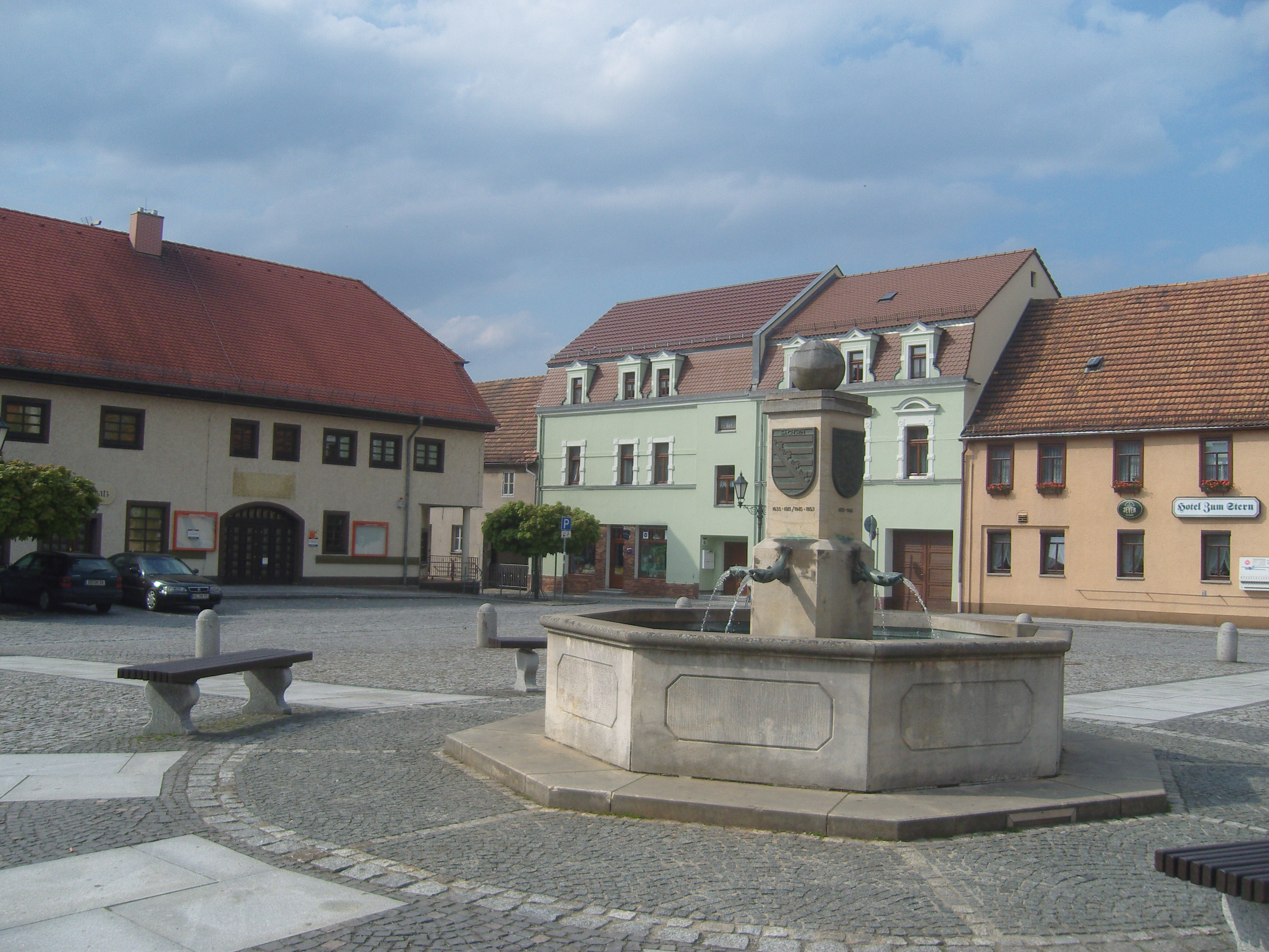 Denkmalgeschützter Markt in Ruhland; Südostanscht am Marktbrunnen vorbei zur Fischerstraße